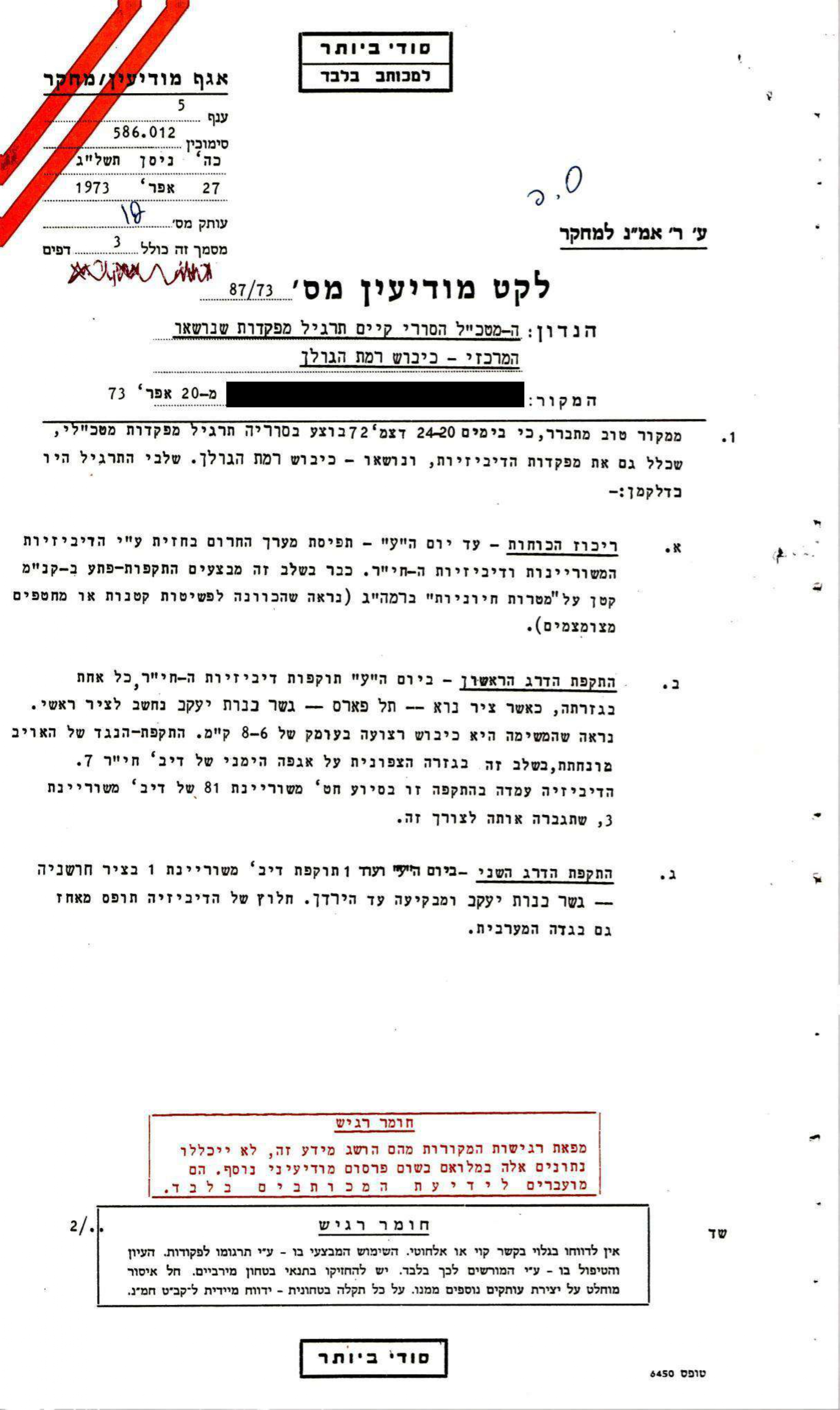 התוכנית הסורית לכיבוש רמת הגולן - התקבלה באמ"ן ב27.4.1973